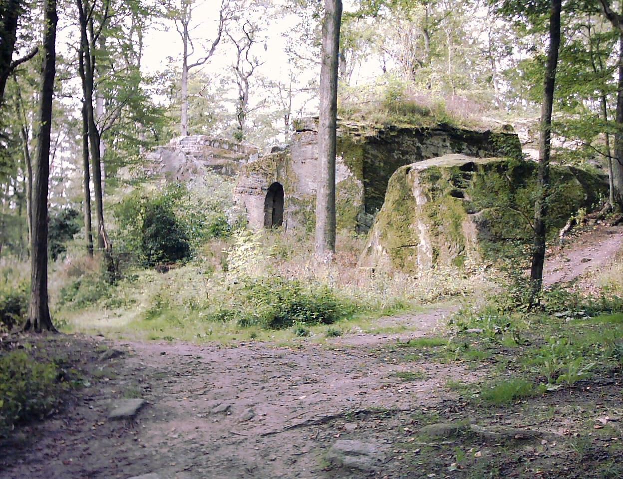 Die Kernburg mit dem Torfelsen